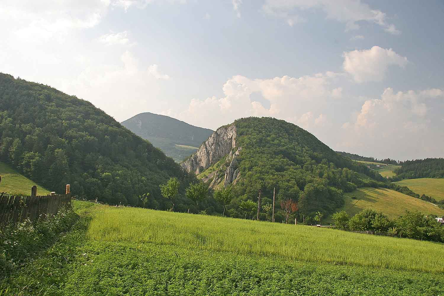 Kostolecká tiesňava - view from villge Kostolec, Súlovské vrchy, district Povážská Bystrica, Slovakia Autor:Prazak Date: 27. 6. 2006